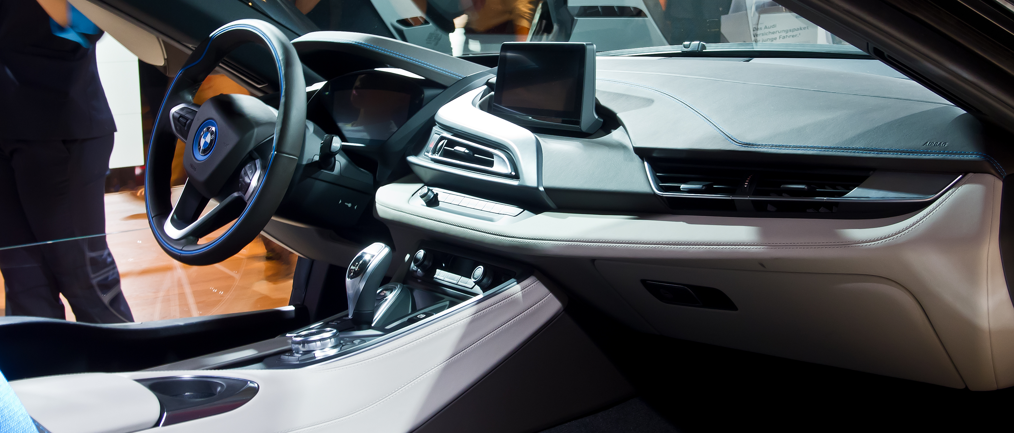 BMW i8